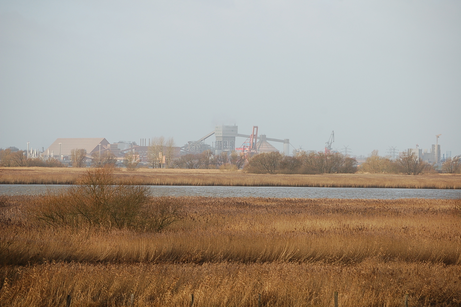 Das Bützflether Industriegebiet von Haseldorf aus gesehen.